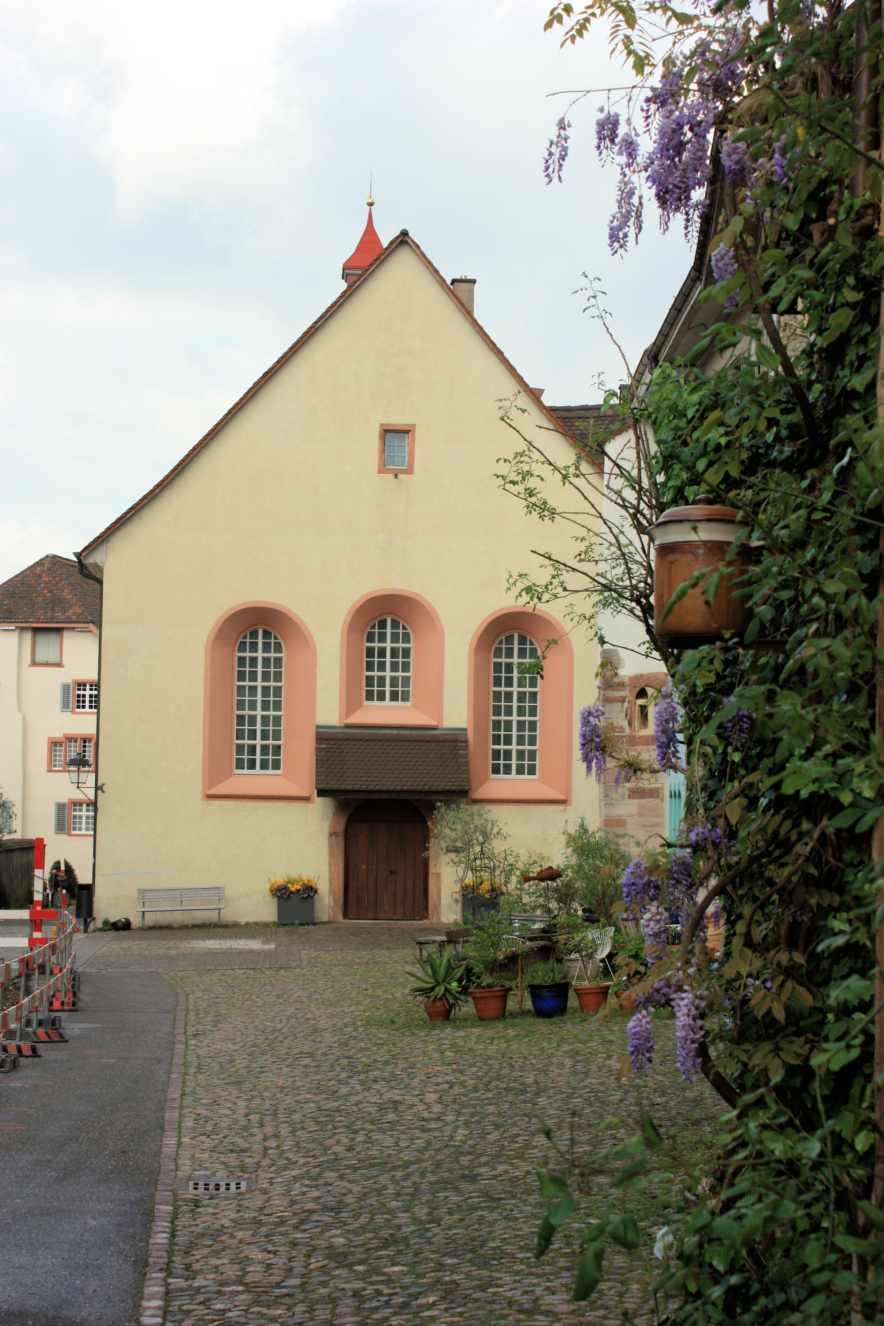 Ehemaliges Kapuzinerkloster Rheinfelden AG. Frontansicht der ehemaligen Laienkirche.